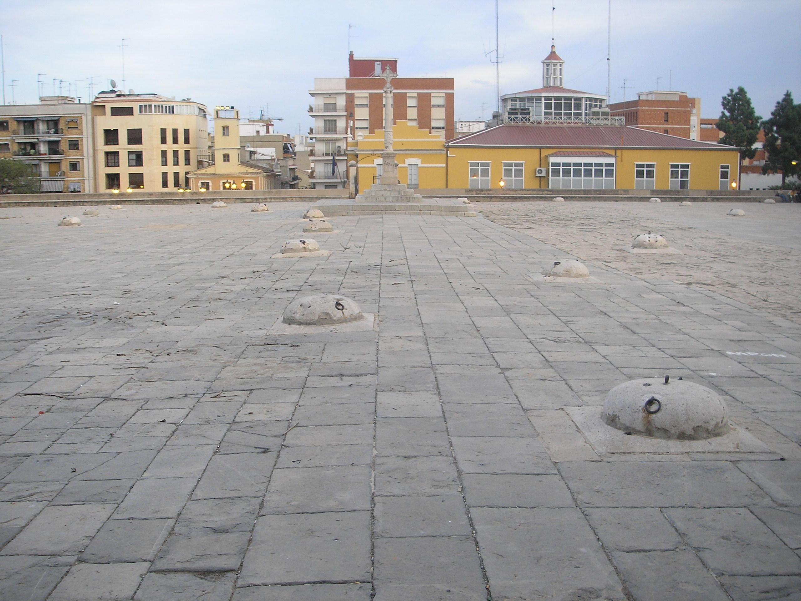 Patio de los Silos de Burjasot